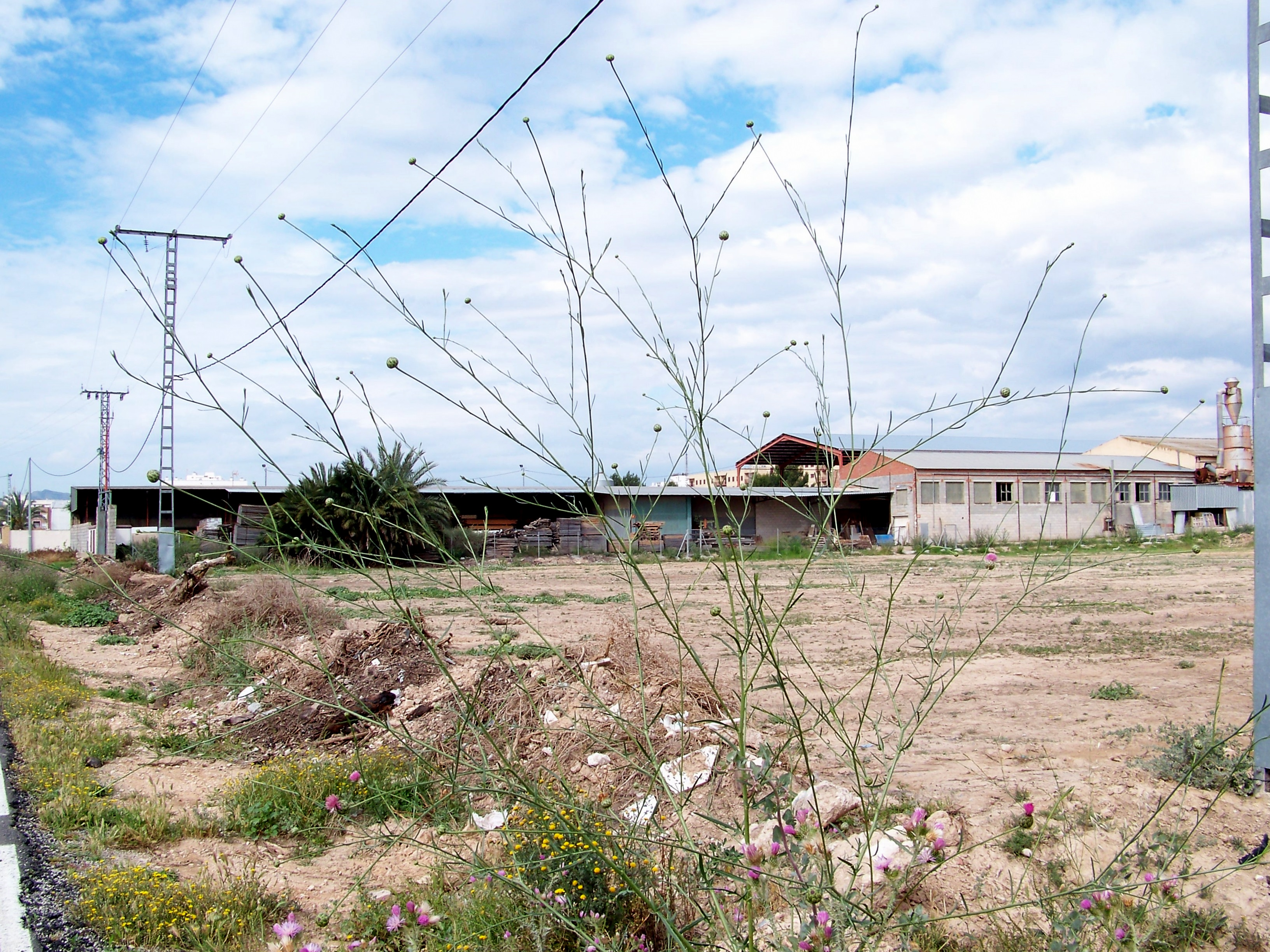 Mantisalca salmantica : Aspecto general (con hojas superiores) - Camino de Elche, Albatera, Alicante (España)